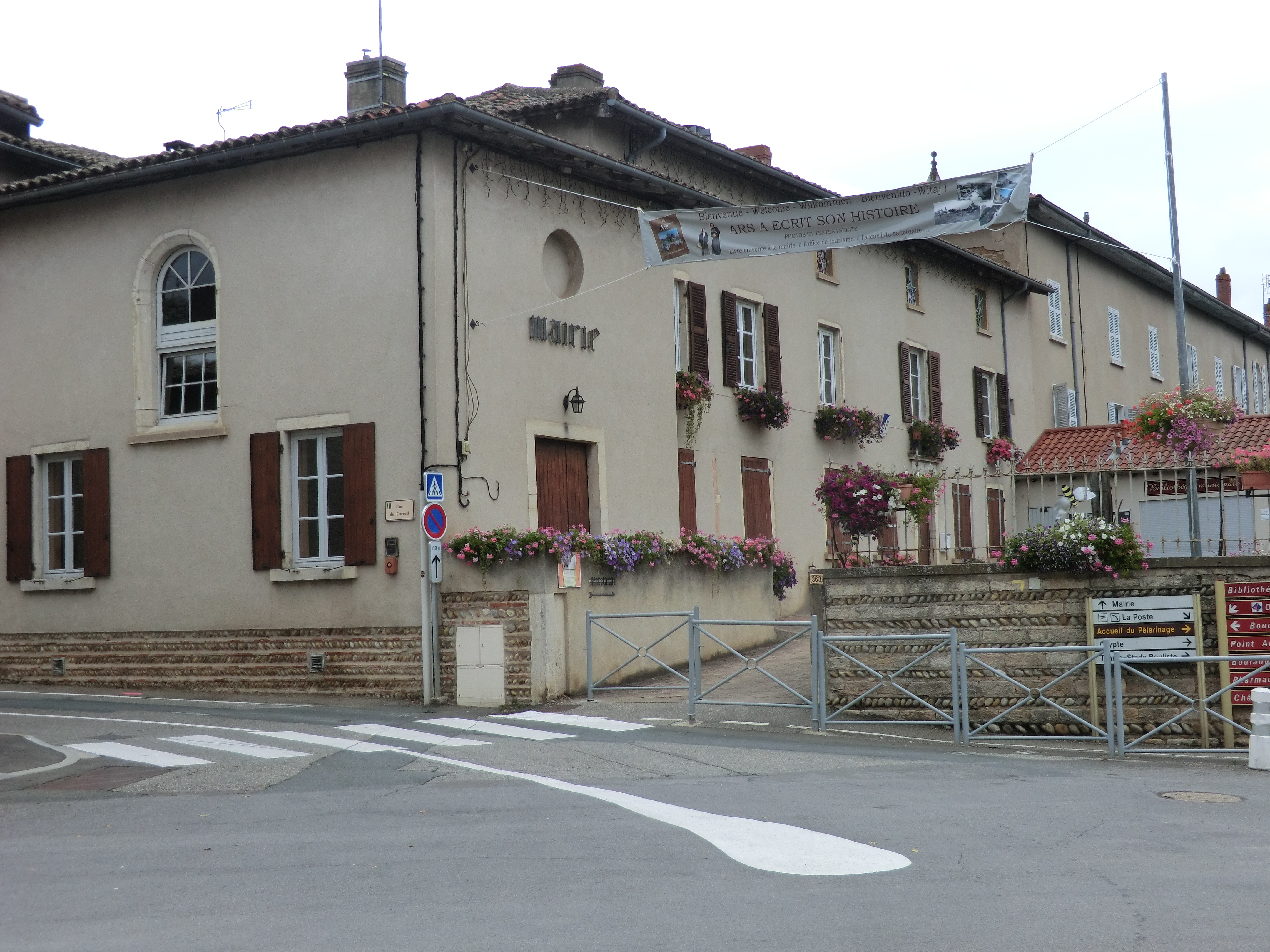 Mairie d'Ars-sur-Formans.